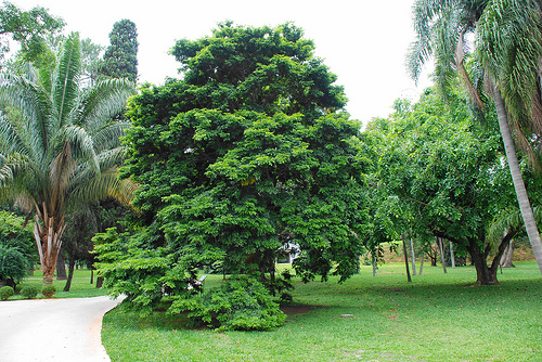 Caesalpinia echinata in de botanische tuin van São Paulo.